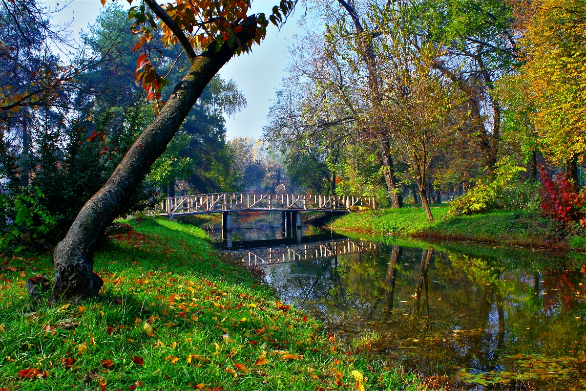 Skopje- Macedonia